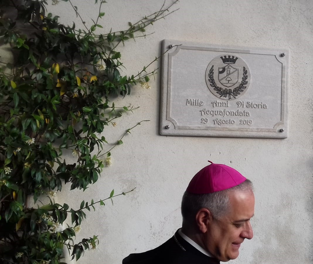 L'Abate di Montecassino, dom Donato Ogliari, inaugura la targa ricordo per i mille anni di Acquafondata